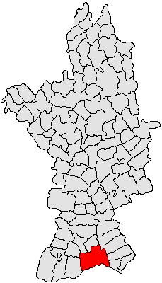 Categorie:Hărţi ale judeţului Olt